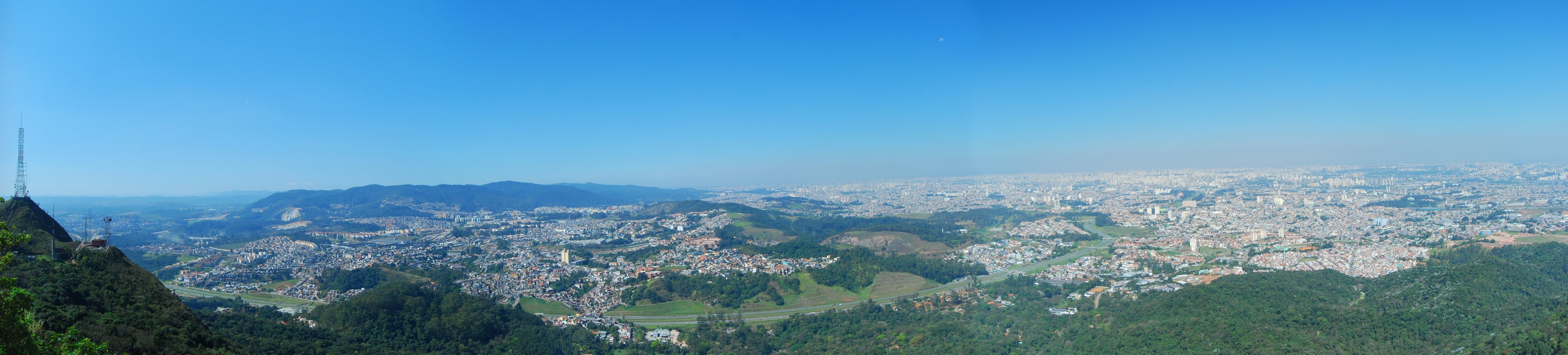 Pico do Jaraguá - Ponto mais alto de São Paulo Altitude: 1.135 metros Vista Panorâmica de São Paulo